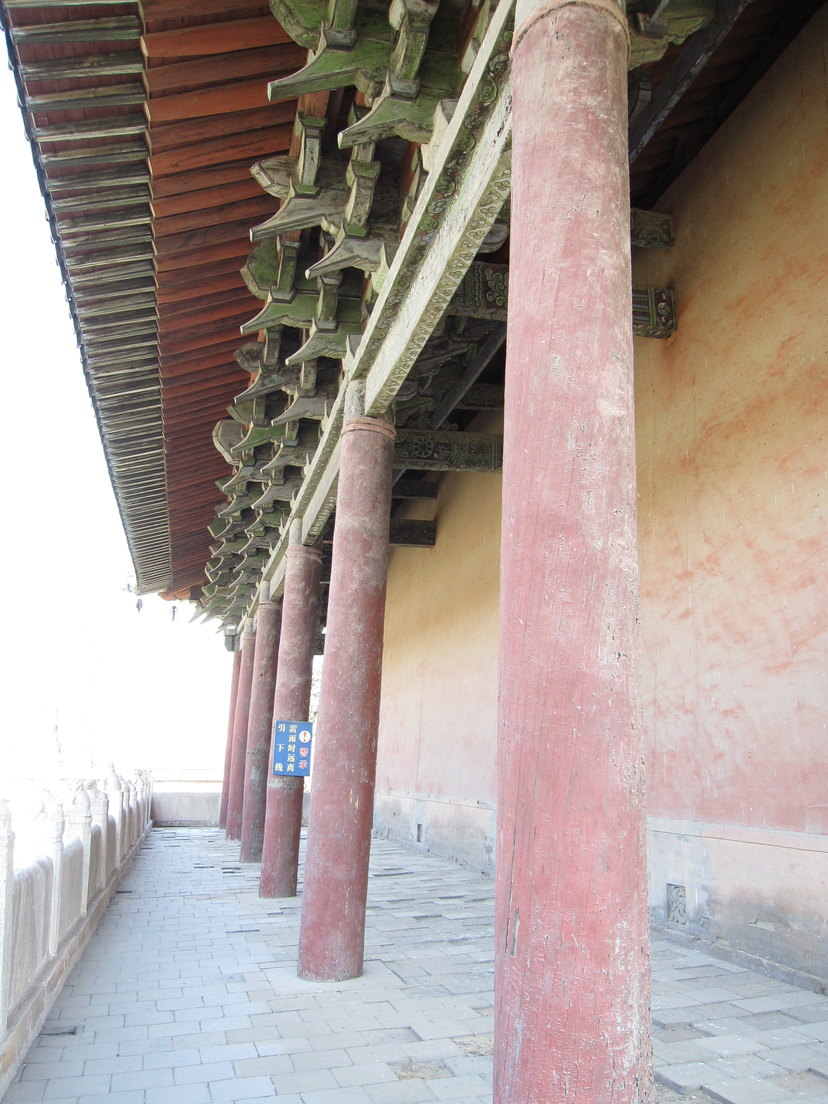 Beiyue Temple